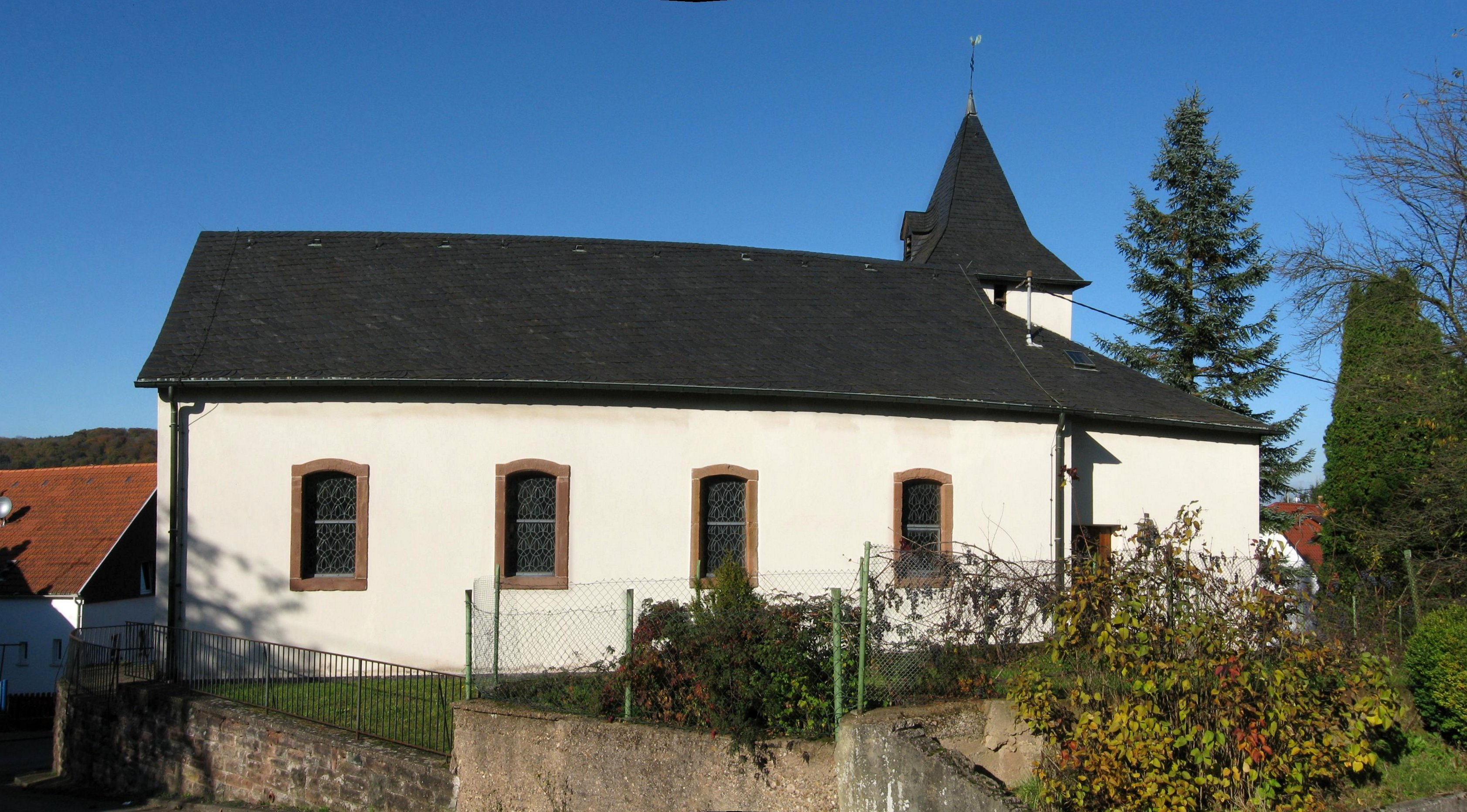 Kapelle in Körprich, Baudenkmal